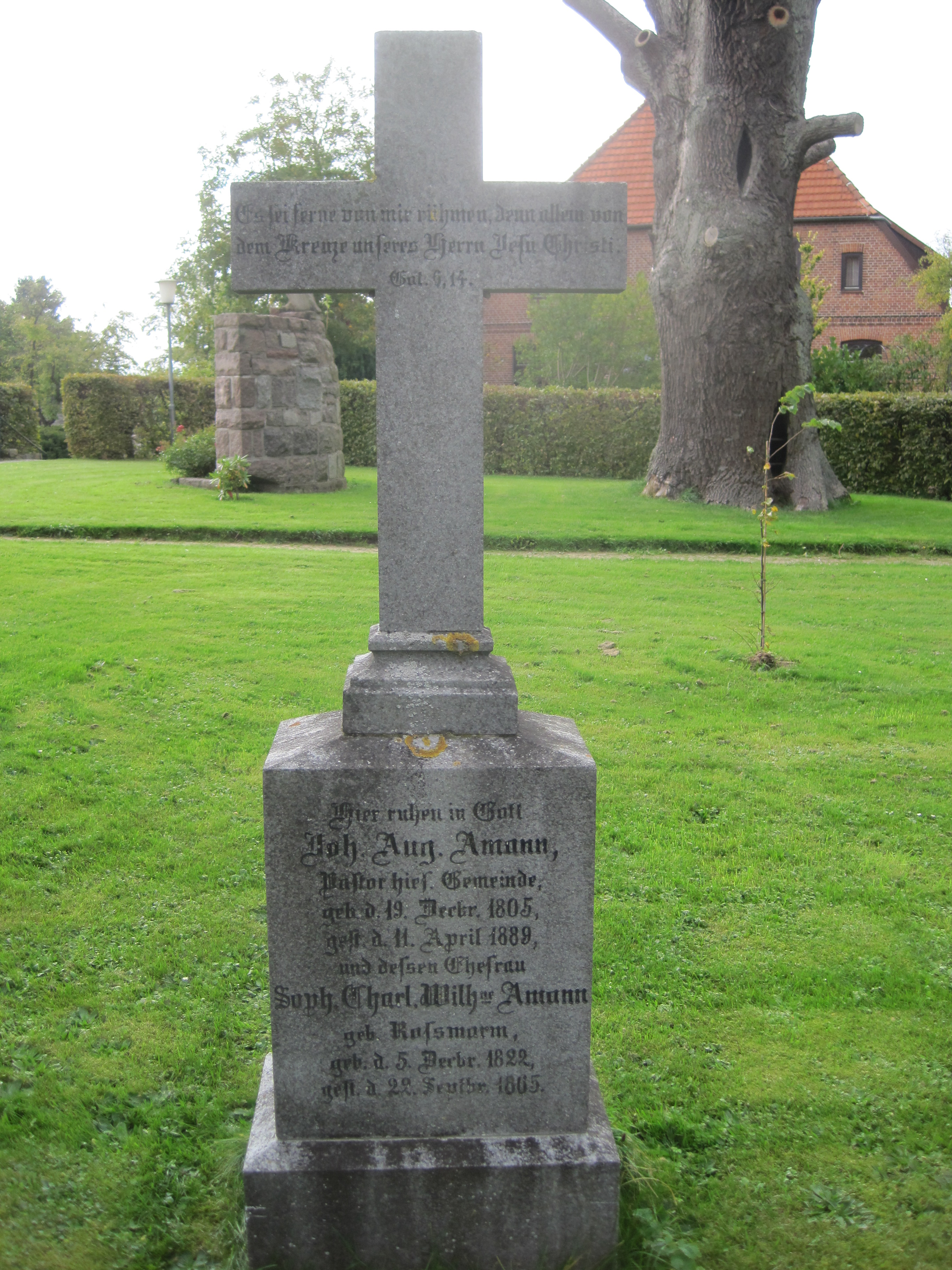 Pastorengrab in Behlendorf